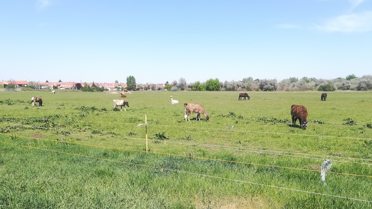 A képen káthatóak lovak, lámák és szamarak is.